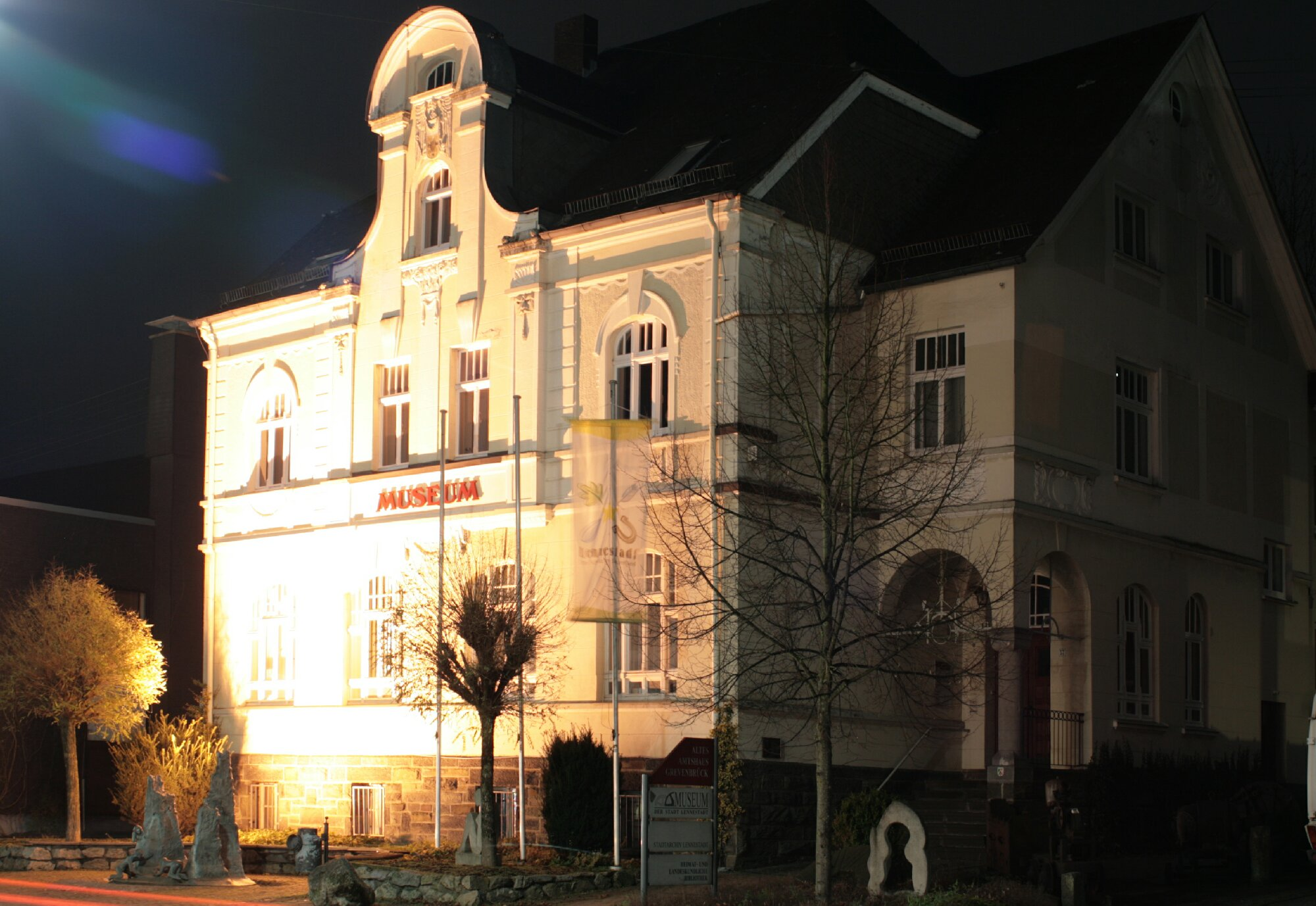 Museum der Stadt Lennestadt Nachtaufnahme